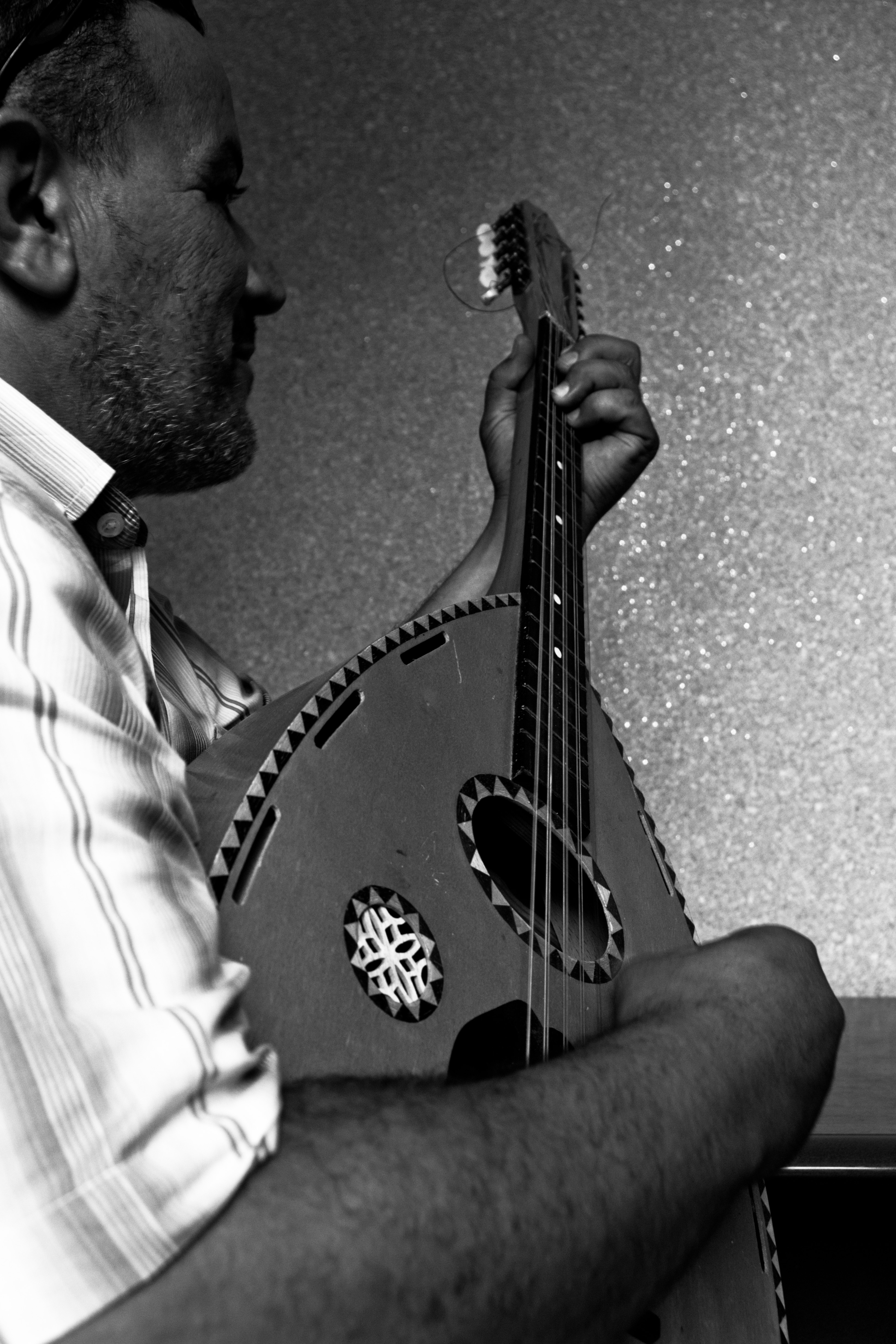 Le Mandole est un instrument de musique à cordes pincées d'origine Méditerranéenne. En Algérie, Il est surtout utilisé en musique chaâbi et en musique kabyle folklorique. This is an image from Algeria